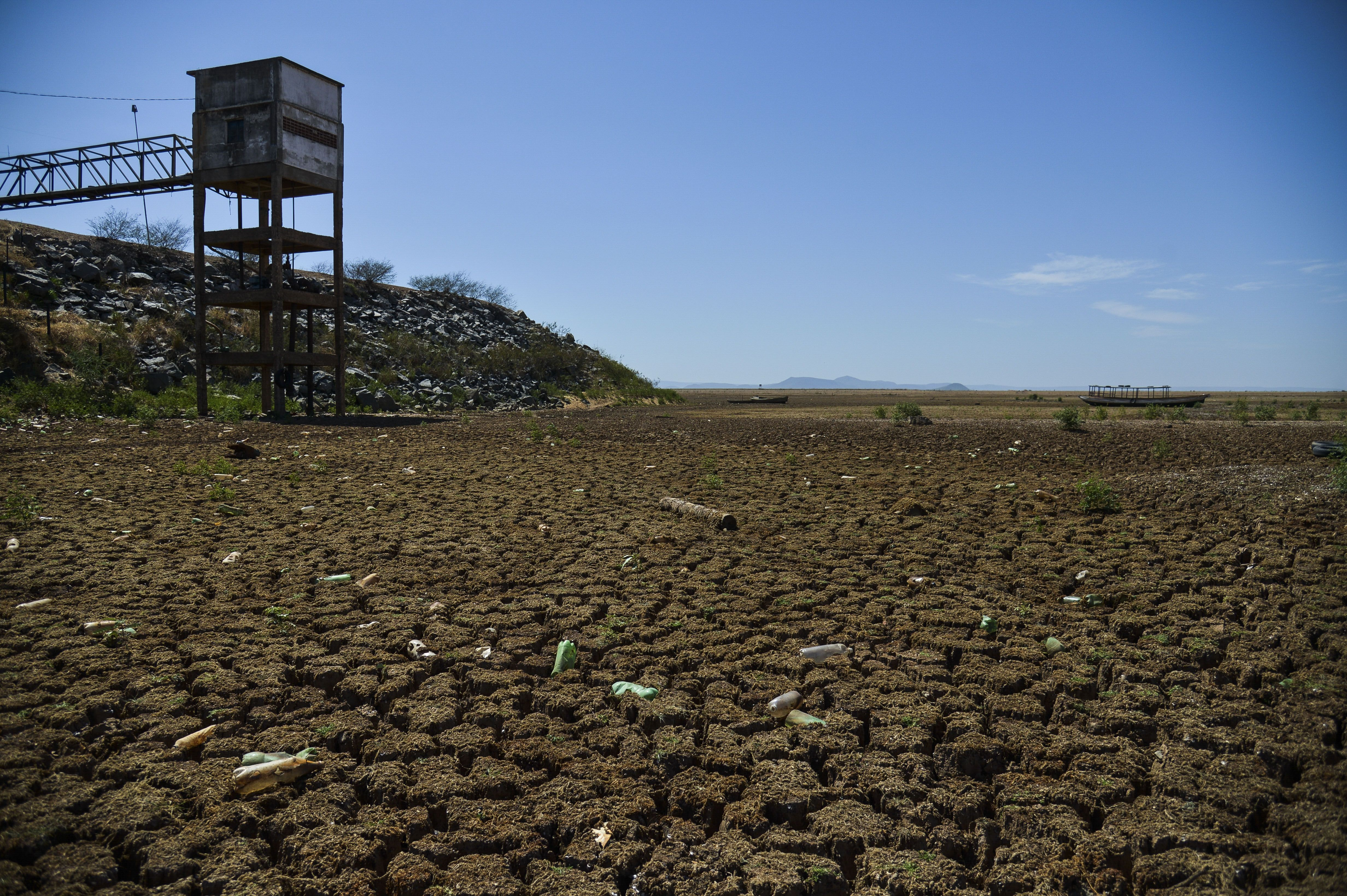 Remanso (BA) - Com a falta de chuva na nascente do Rio São Francisco, o reservatório de Sobradinho vive a maior seca de sua história.